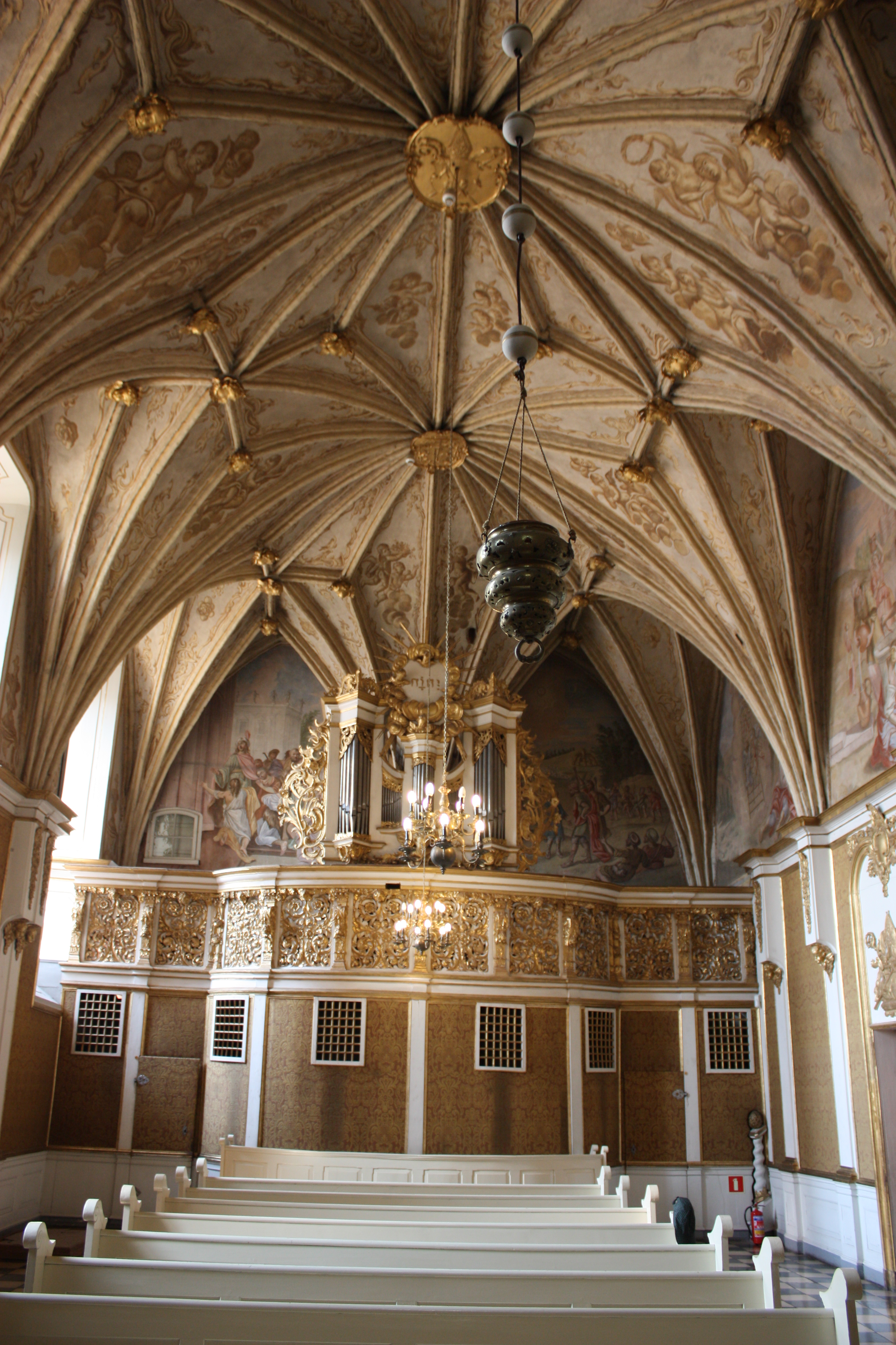 Lidzbark Warmiński, zamek biskupi, ob. muzeum, XIV, XIX